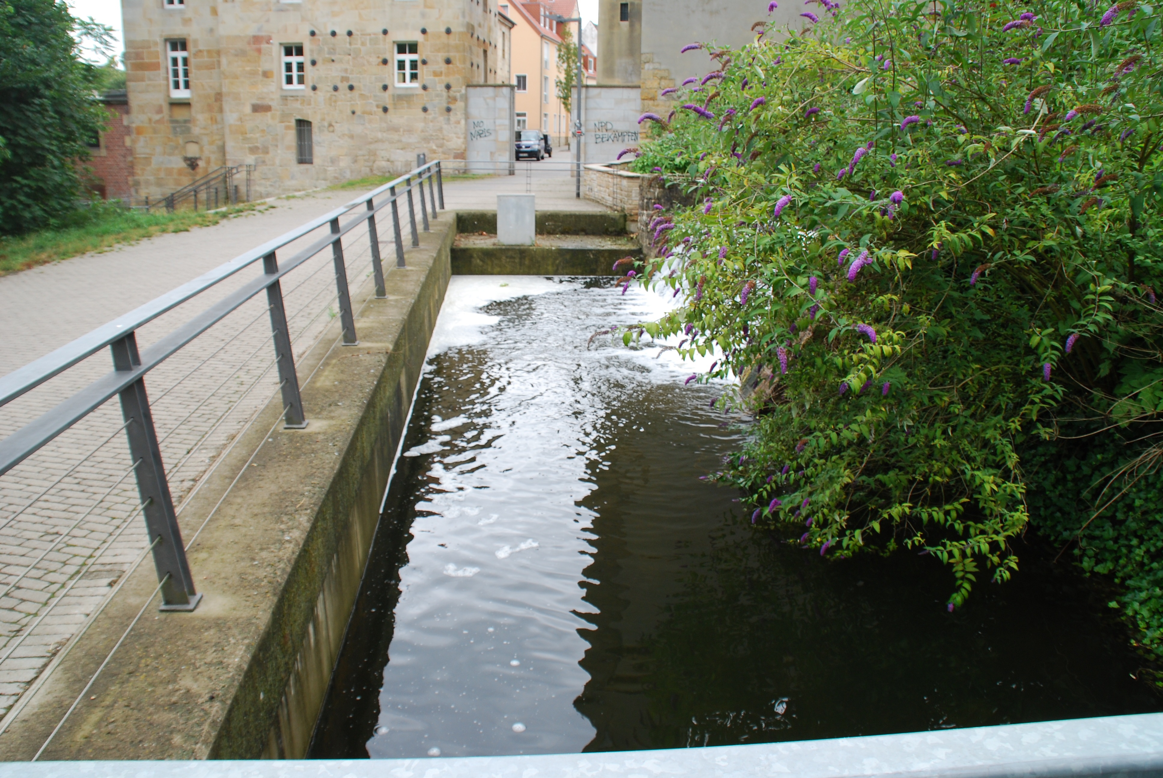 Einlaufbauwerk Salinenkanal (Abzweig der Ems zur Saline Gottesgabe) an der Emsmühle, Rheine